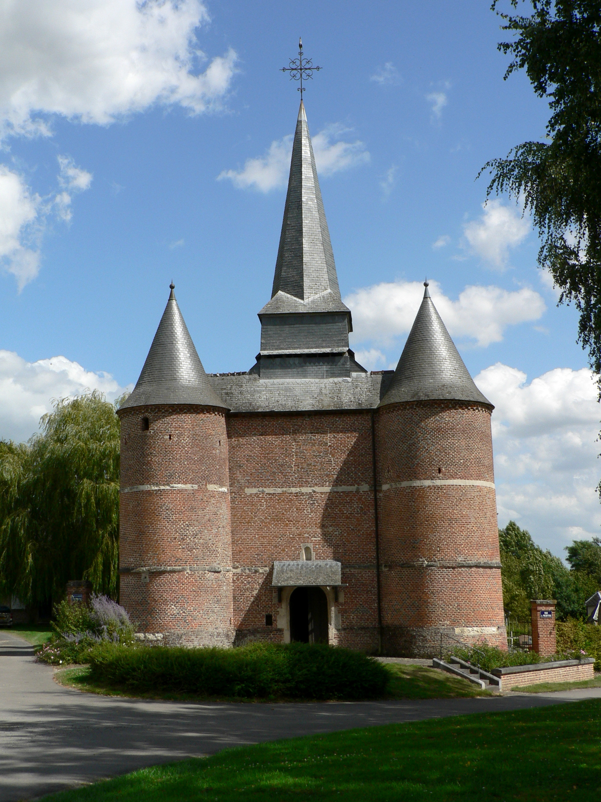 Église fortifiée de Gronard, Aisne, France